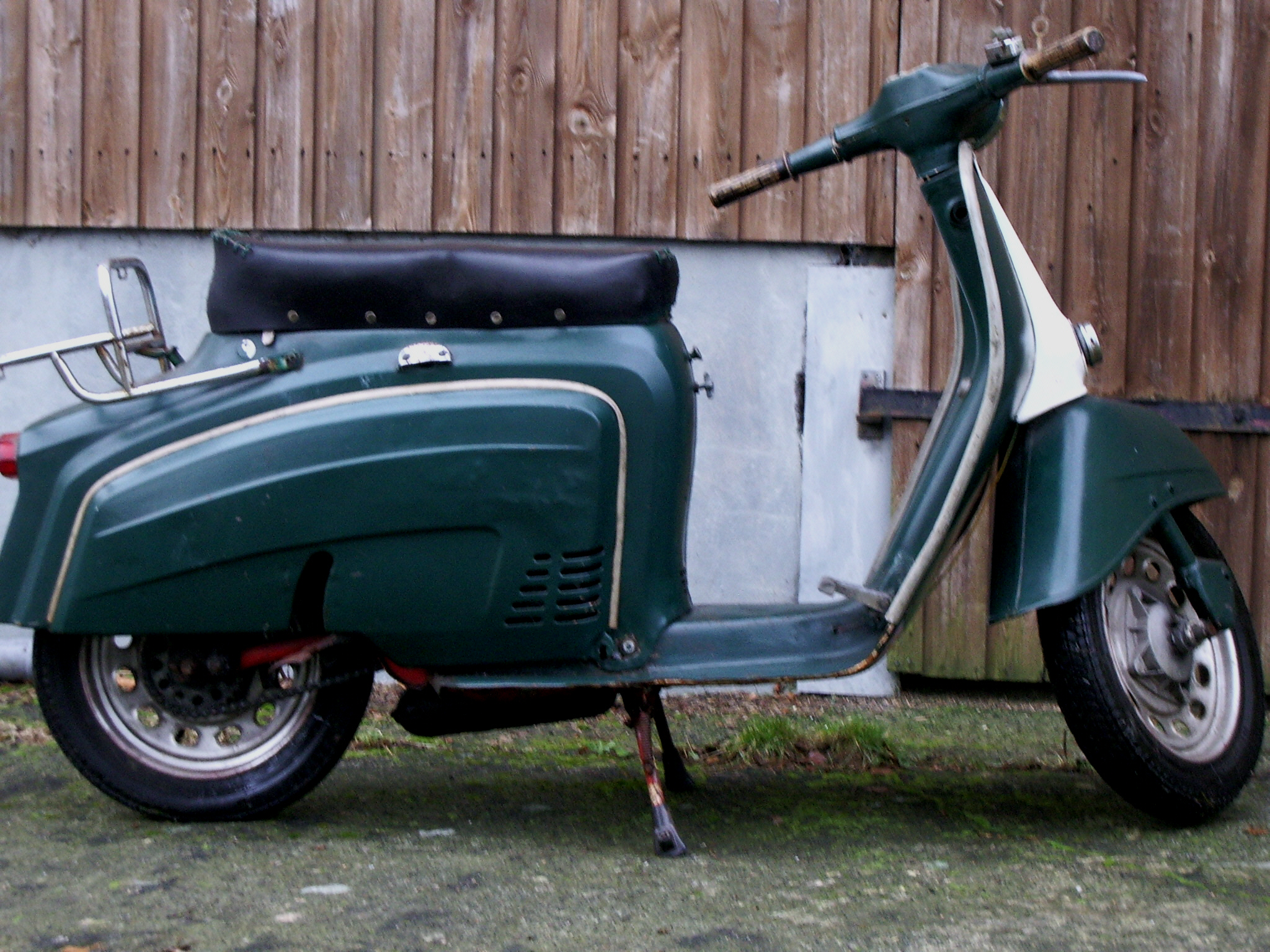 Garelli Capri Roller Baujahr 1967 (Unrestaurierter Zustand, Scheunenfund).